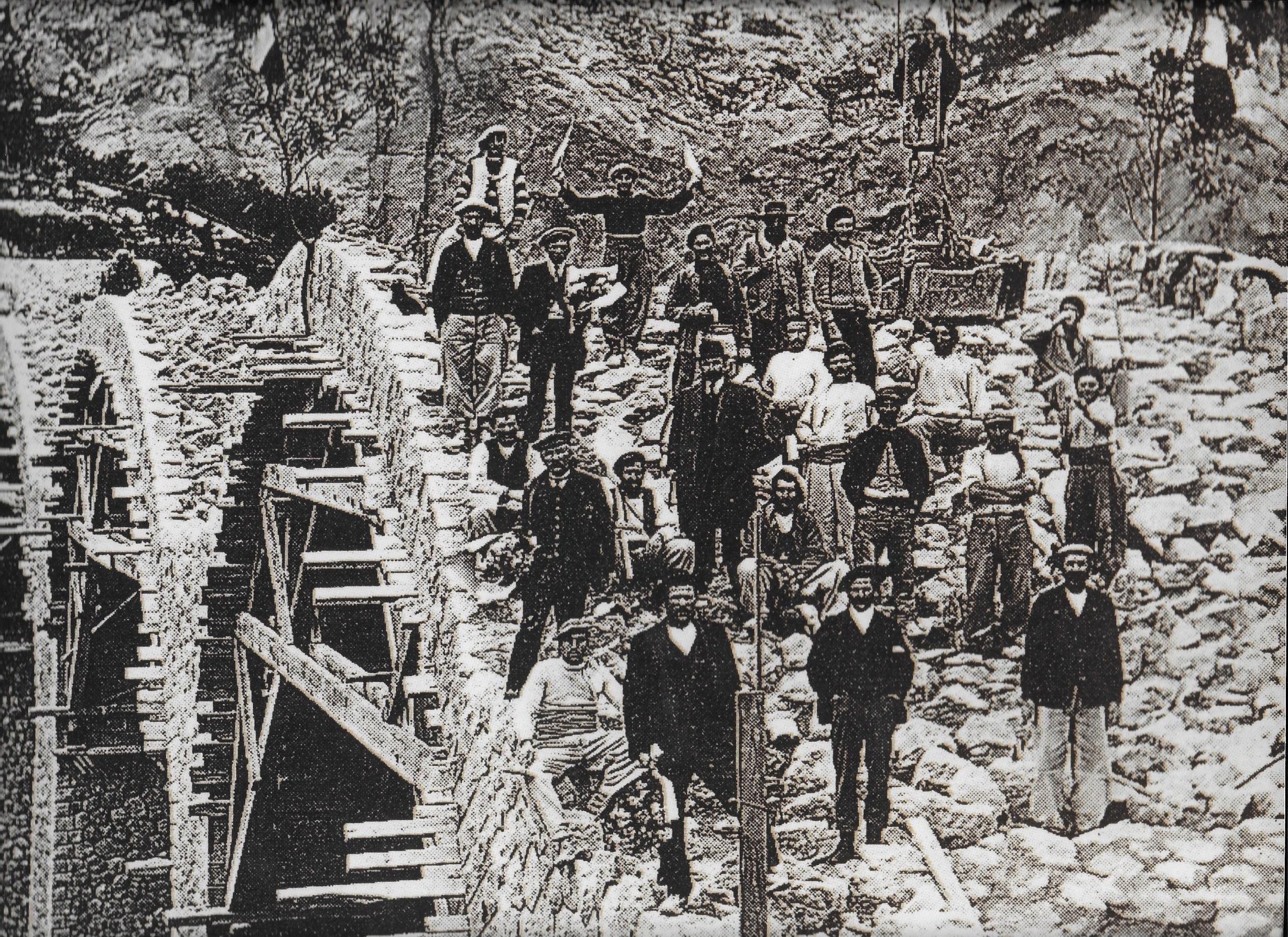 travail d'après photo habitante Riaux